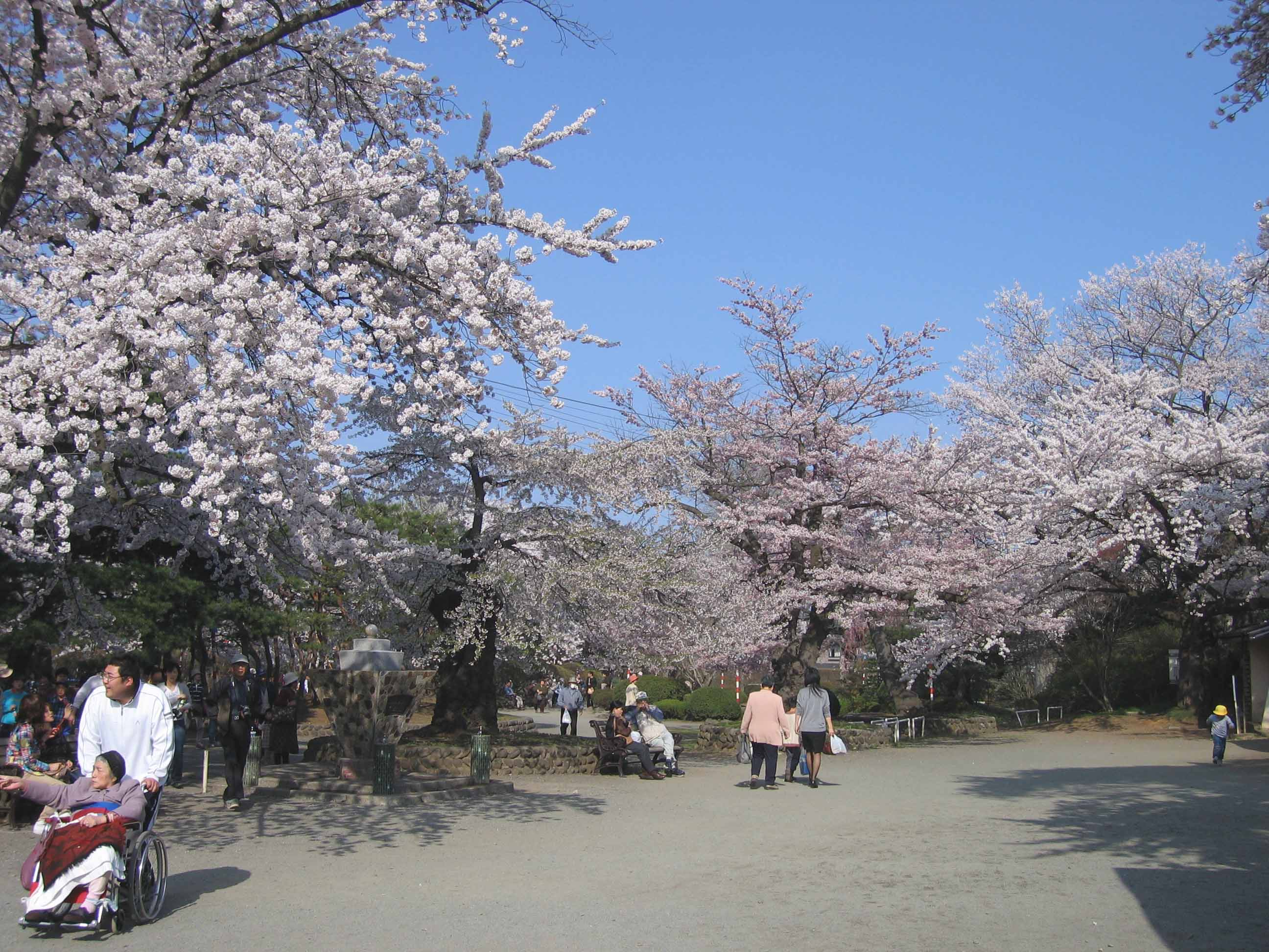 水沢公園さくらまつり